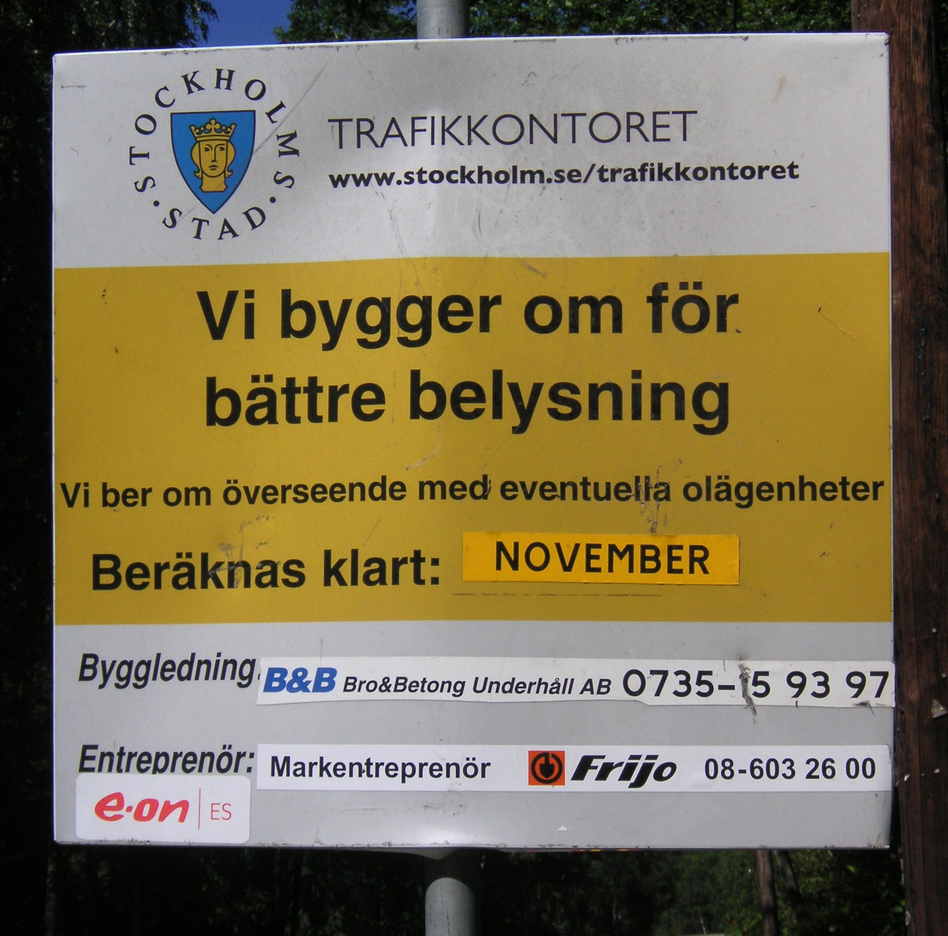 Trafikkontoret bygger om belysning i standen